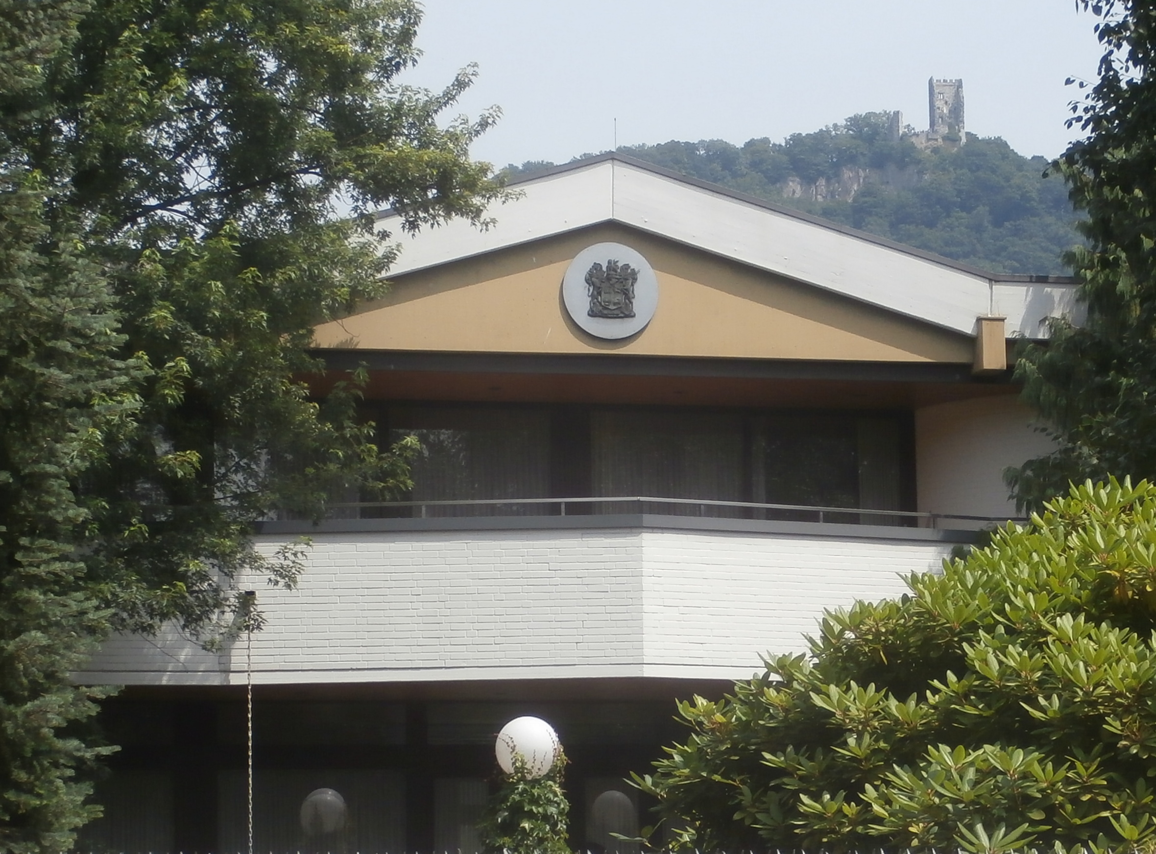 Ehemalige Residenz der Botschaft von Südafrika, Rüdigerstraße 20, Mehlem, Bad Godesberg